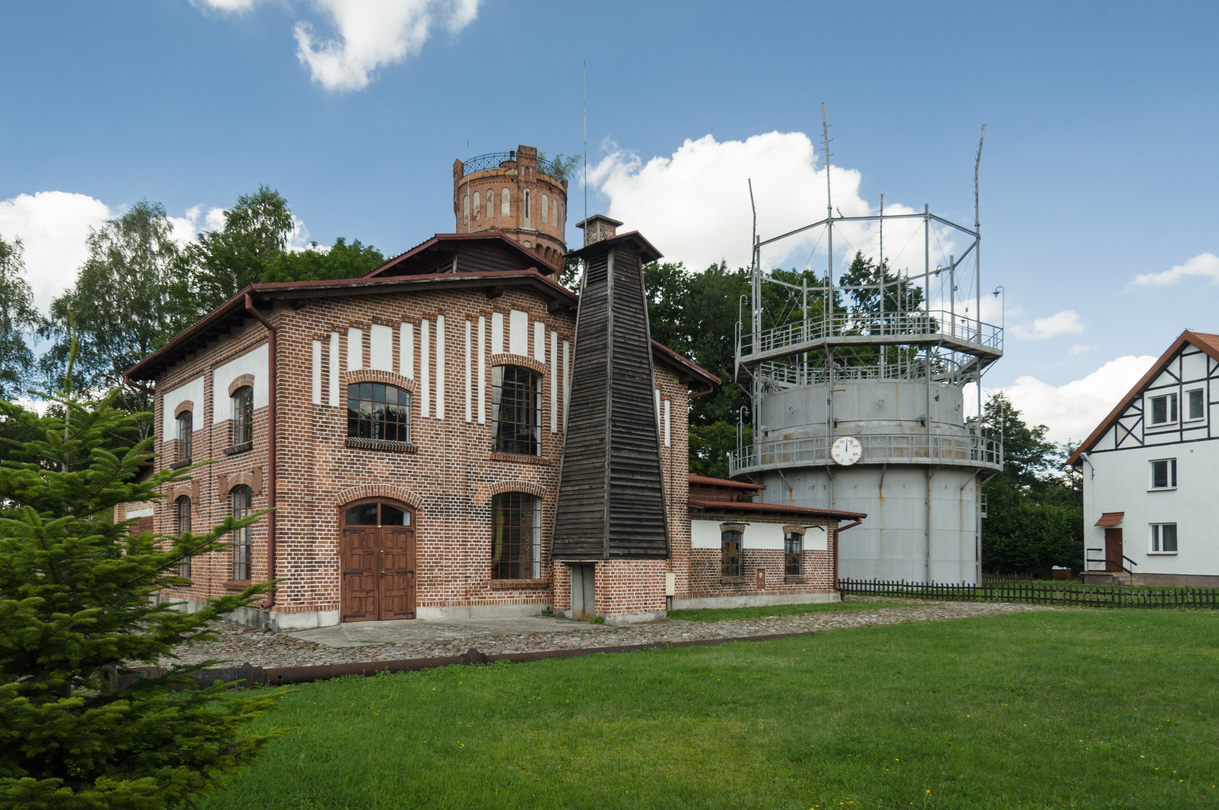 Zabytkowa gazownia z roku 1908 w Górowie Iławeckim, ul. Wyszyńskiego 20: zbiornik wyrównawczy i budynek administracyjny.